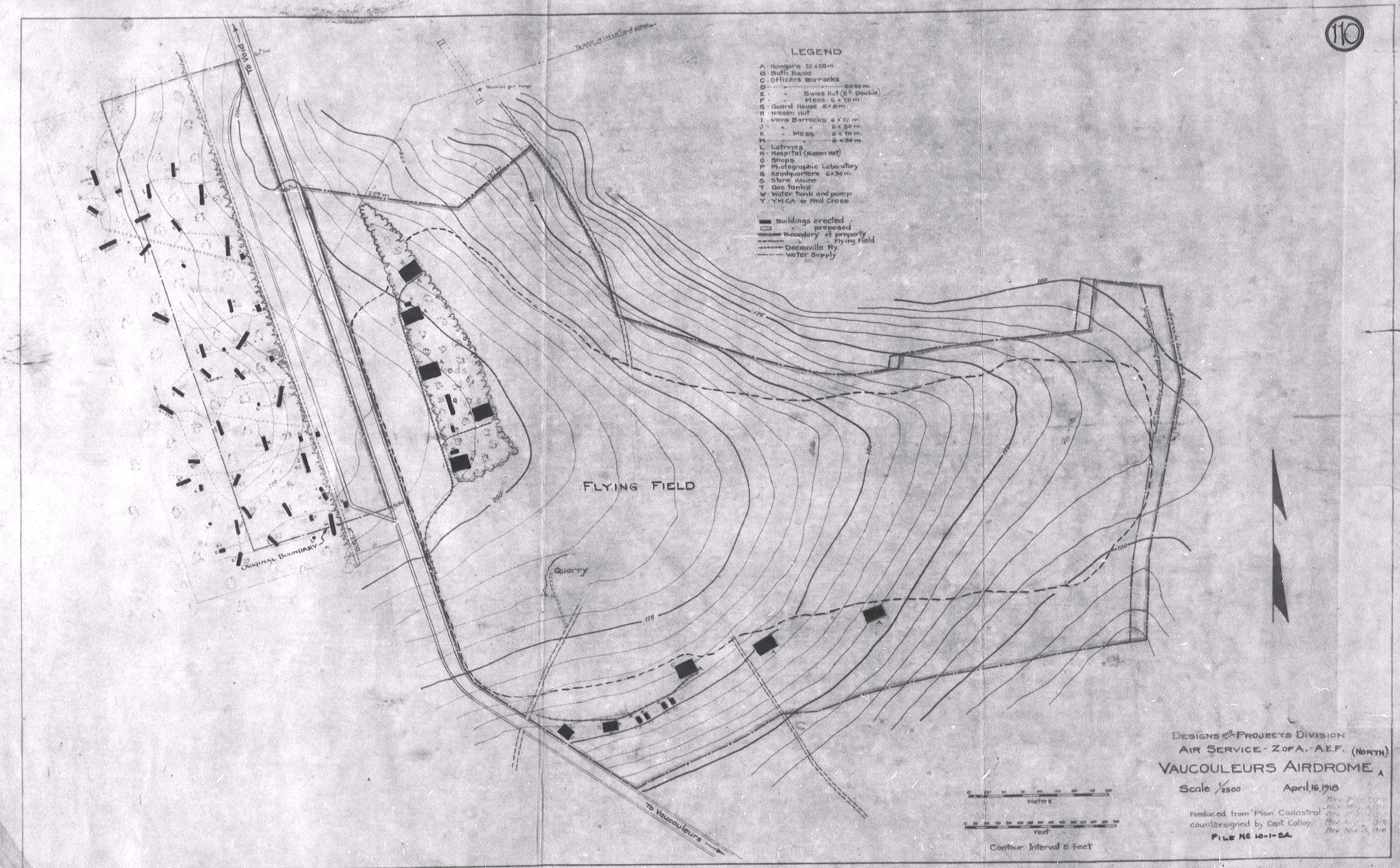 Vaucouleurs Aerodrome - North - Map - France